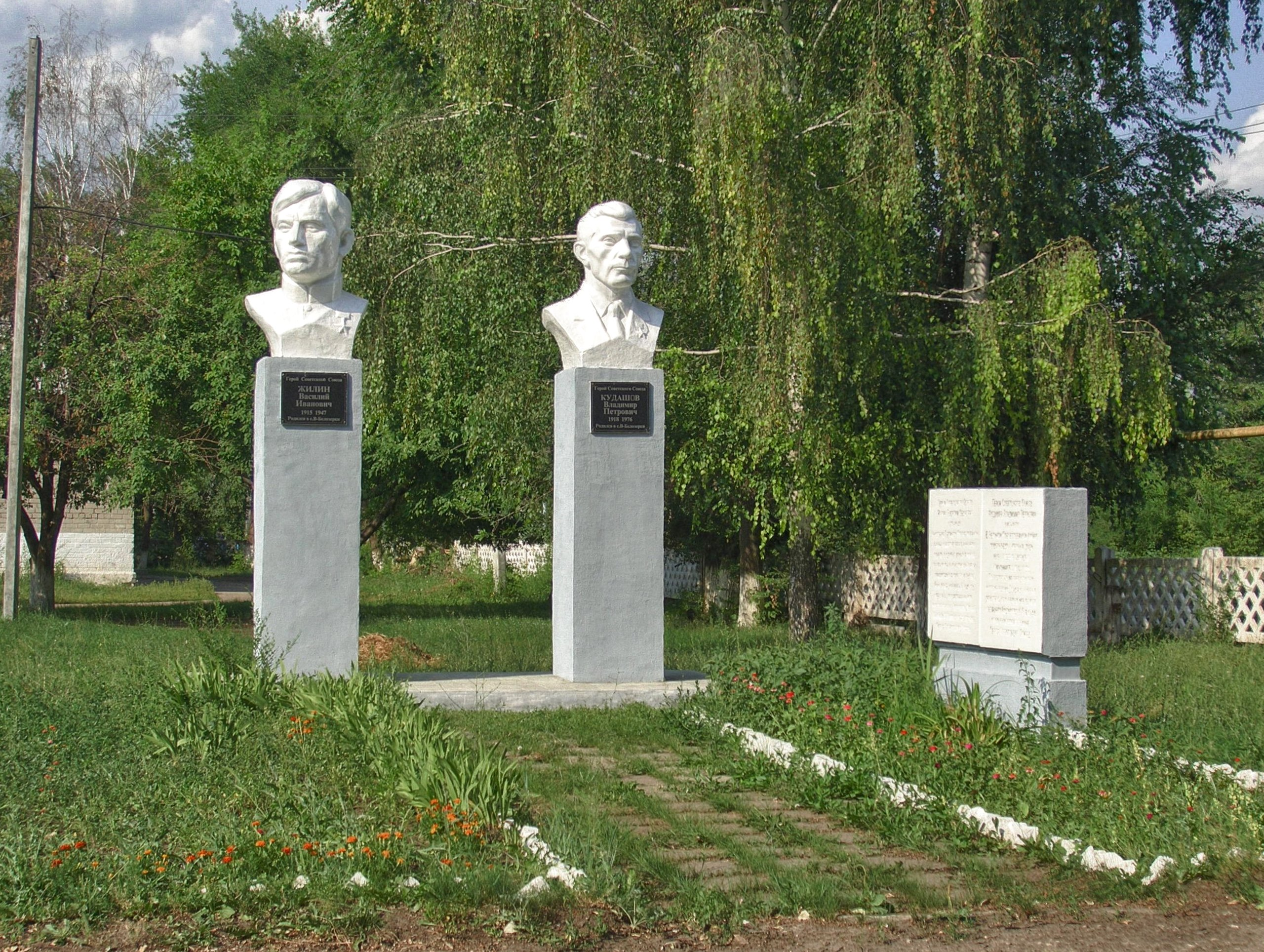 Бюсты Героям Советского Союза, родившимся в селе - Василию Жилину и Владимиру Кудашову, Верхние Белозёрки, Ставропольский район, Самарская область, Россия